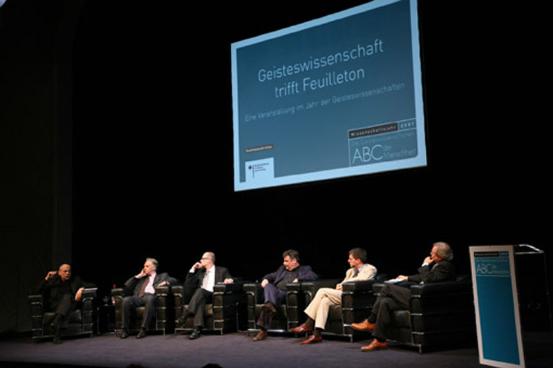 "Geisteswissenschaft trifft Feuilleton", Podiumsdiskussion am 8. Mai 2007